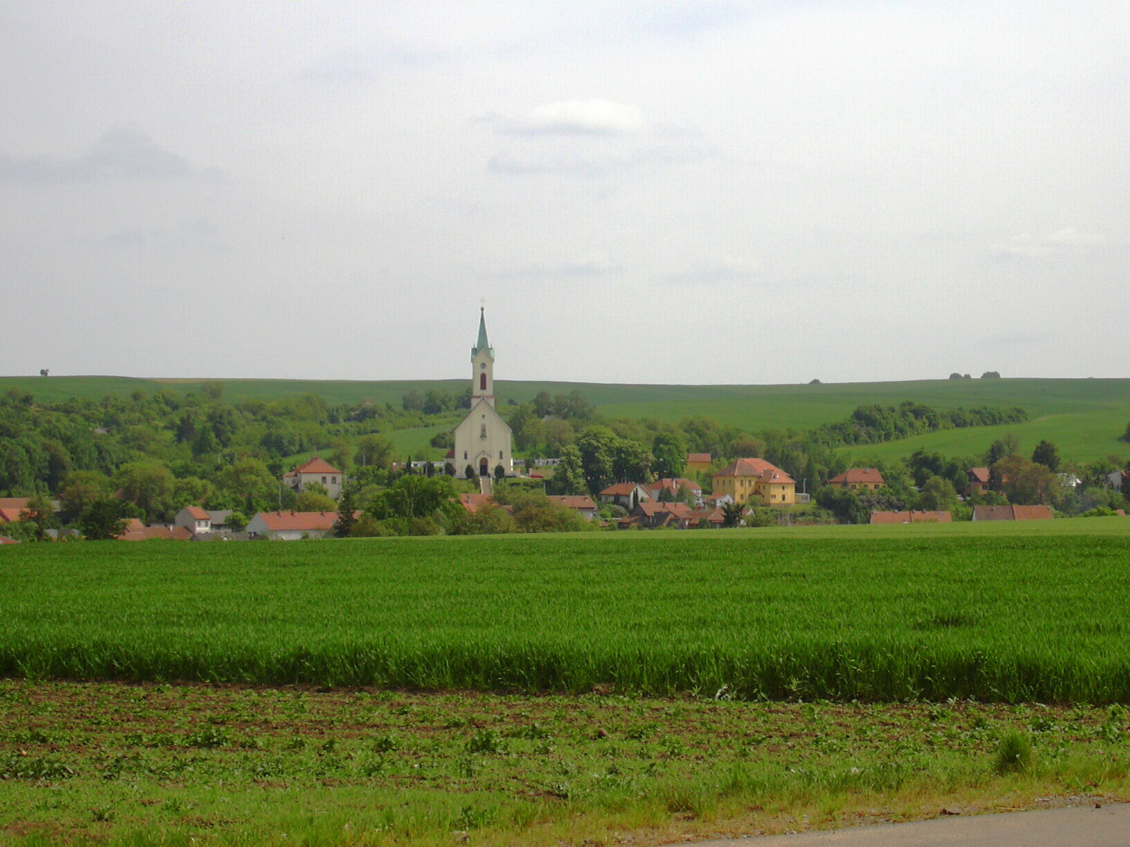 Panorama Švábenic (Vyškov- Czech republic)